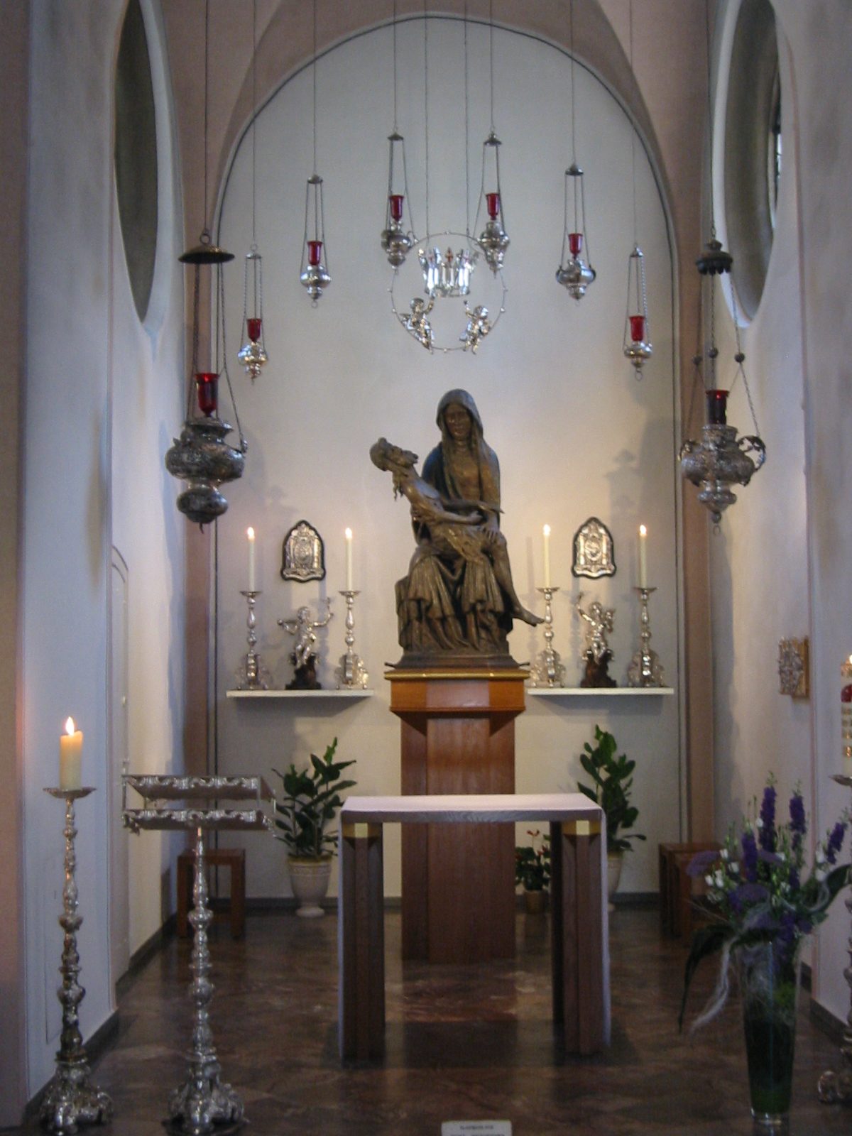 Die schmerzhafte Mutter in Telgte